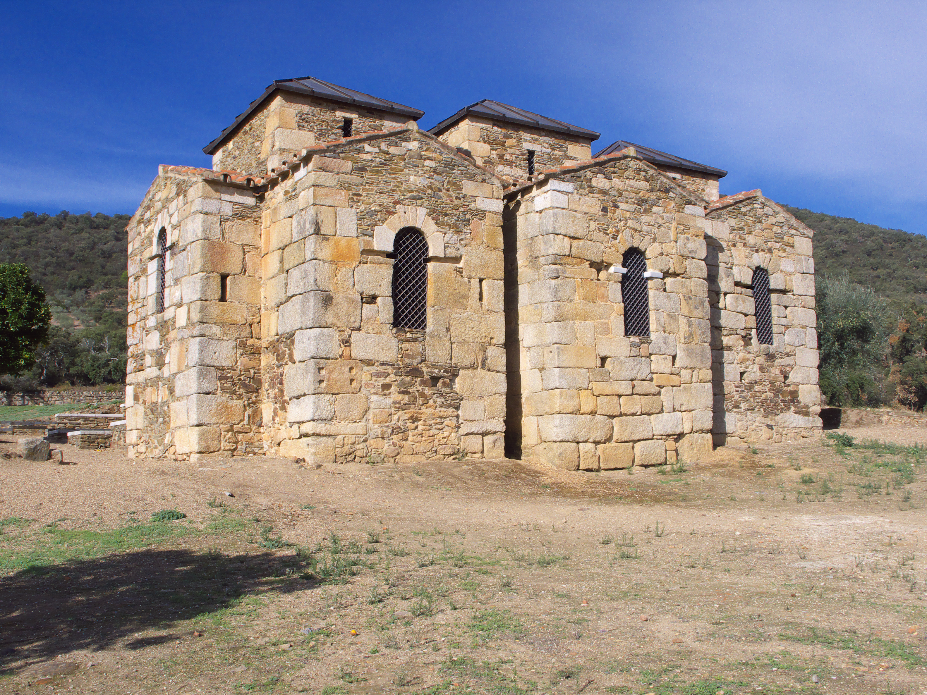 Iglesia del Monasterio del Trampal. Visigodo. Alcuéscar. El monasterio gozaba de la abundante agua de la fuente del Trampal.